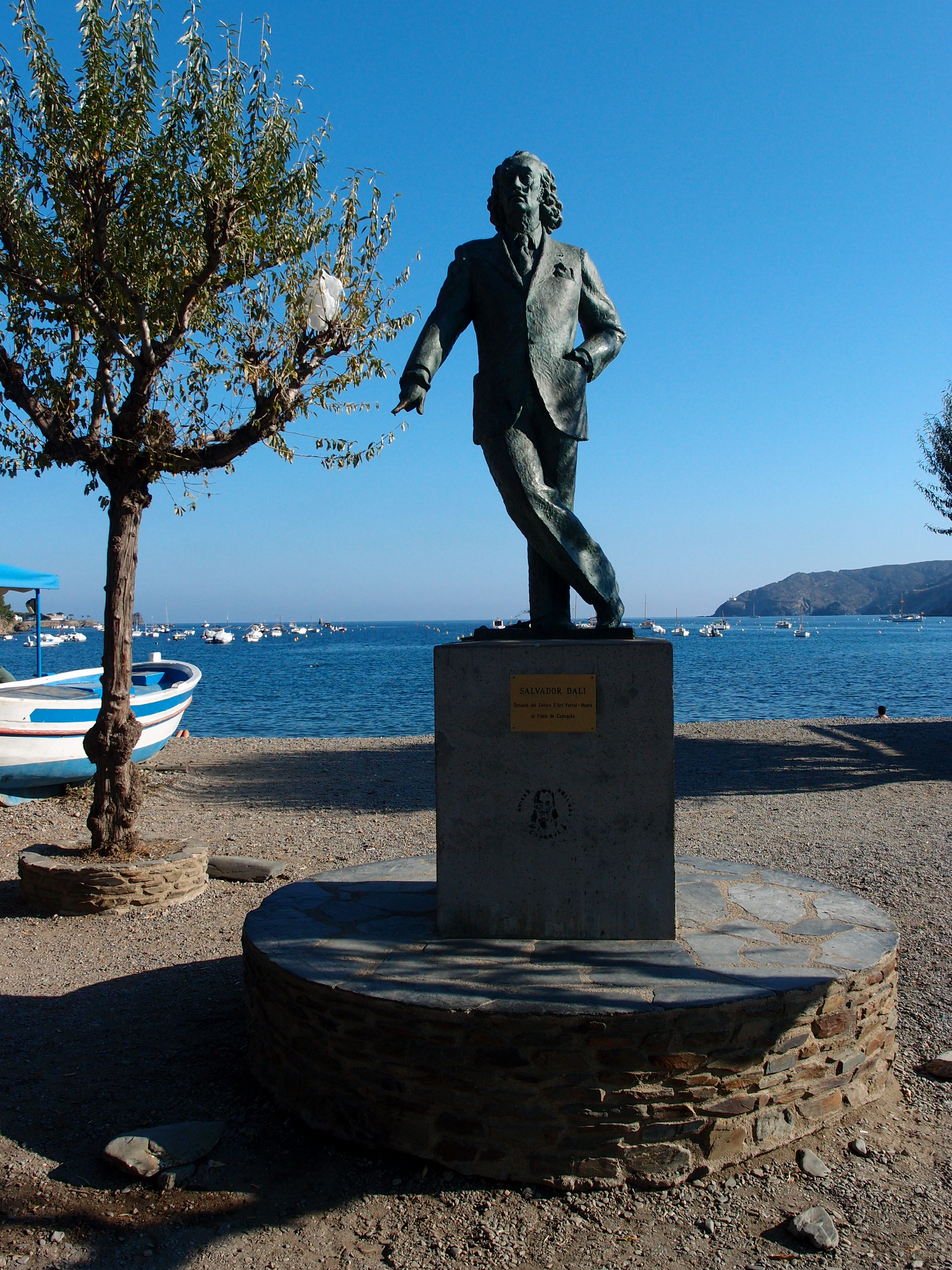 Salvador Dalí Denkmal in Cadaqués Datum: 25.09.2011 Urheber: M. Pfeiffer alias Benutzer:Gordito1869 Quelle: Privates Fotoarchiv des Urhebers